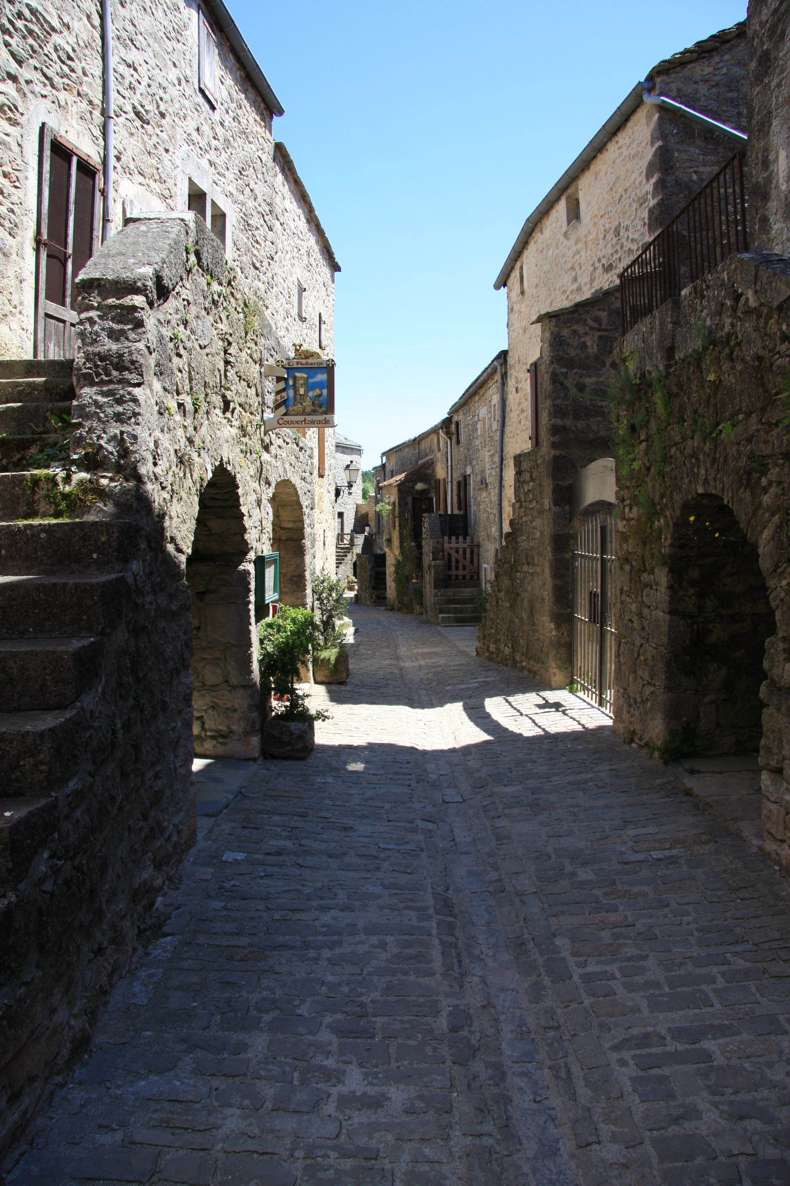 Rue de la Couvertoirade en Aveyron (France)